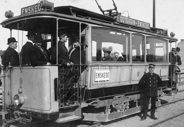 Spårvagn på Kyrkogårdsvägens hållplats på Enskedebanan år 1910